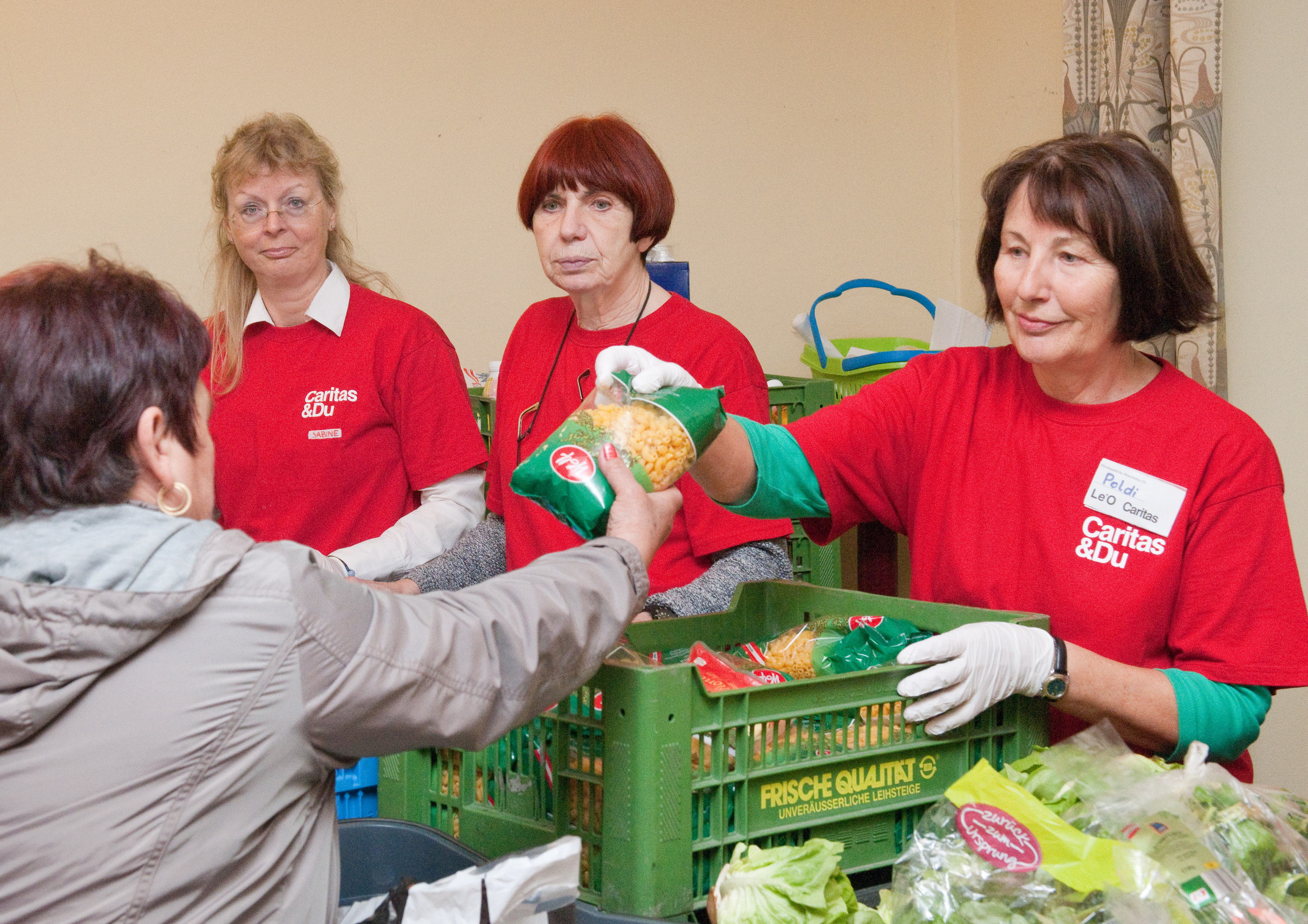 Mitwirkende des Projekts Le+O – Lebensmittel und Orientierung der Caritas der Erzdiözese Wien in der Pfarre Maria Lourdes in Wien-Meidling.